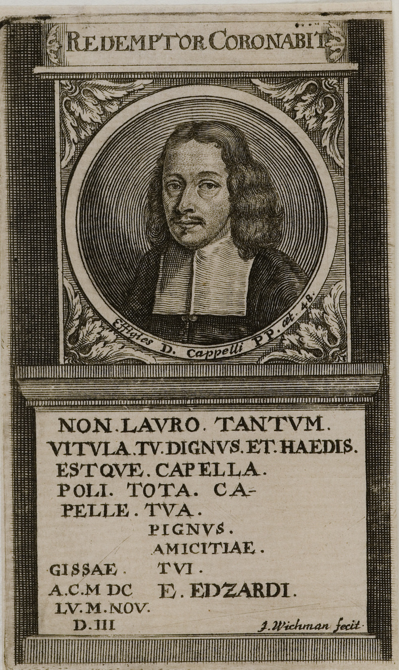 Bildnis von Rudolph Capell